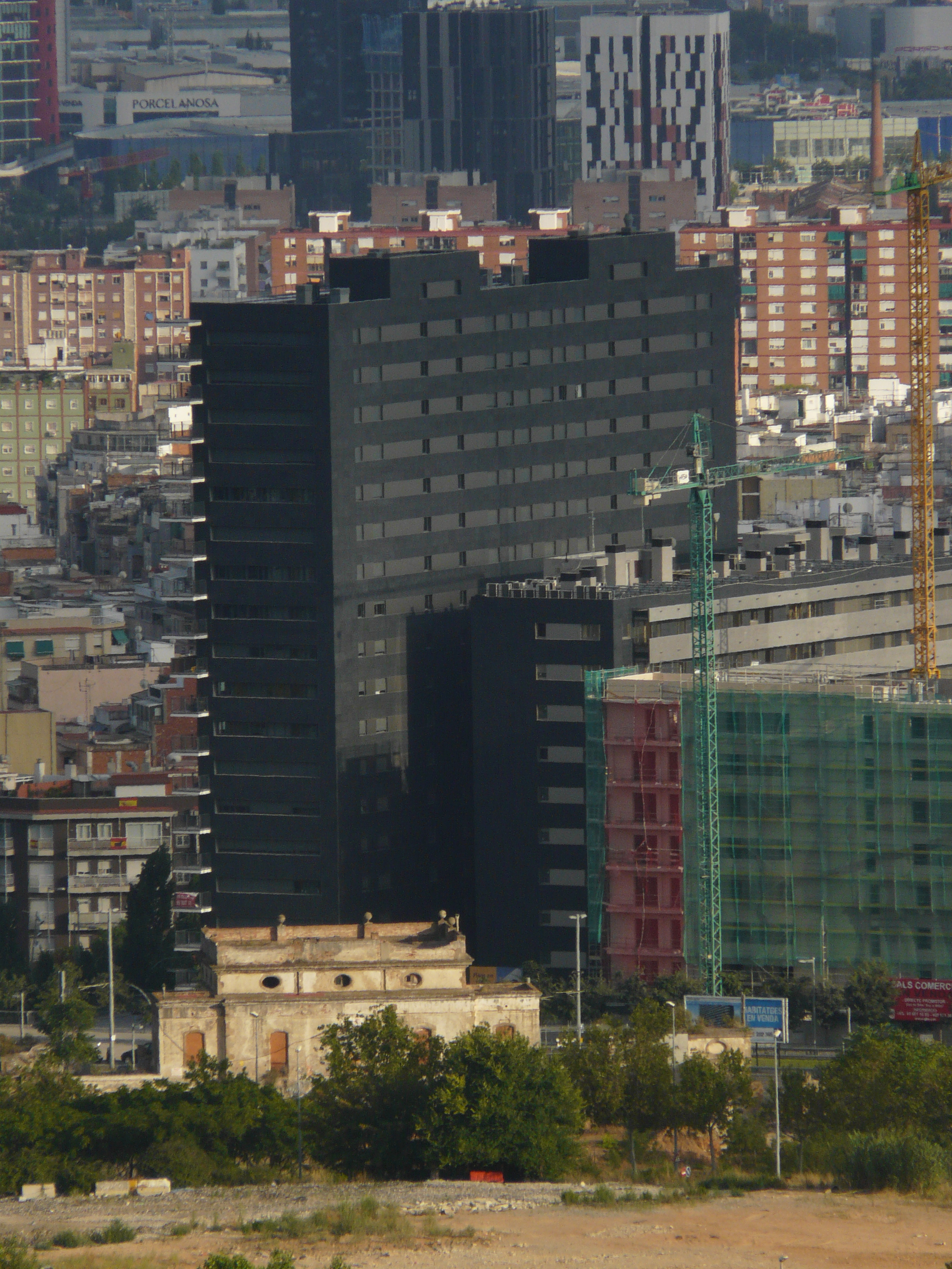 Can Rigalt (l'Hospitalet de Llobregat) Object location41° 22′ 34.58″ N, 2° 06′ 29.85″ E